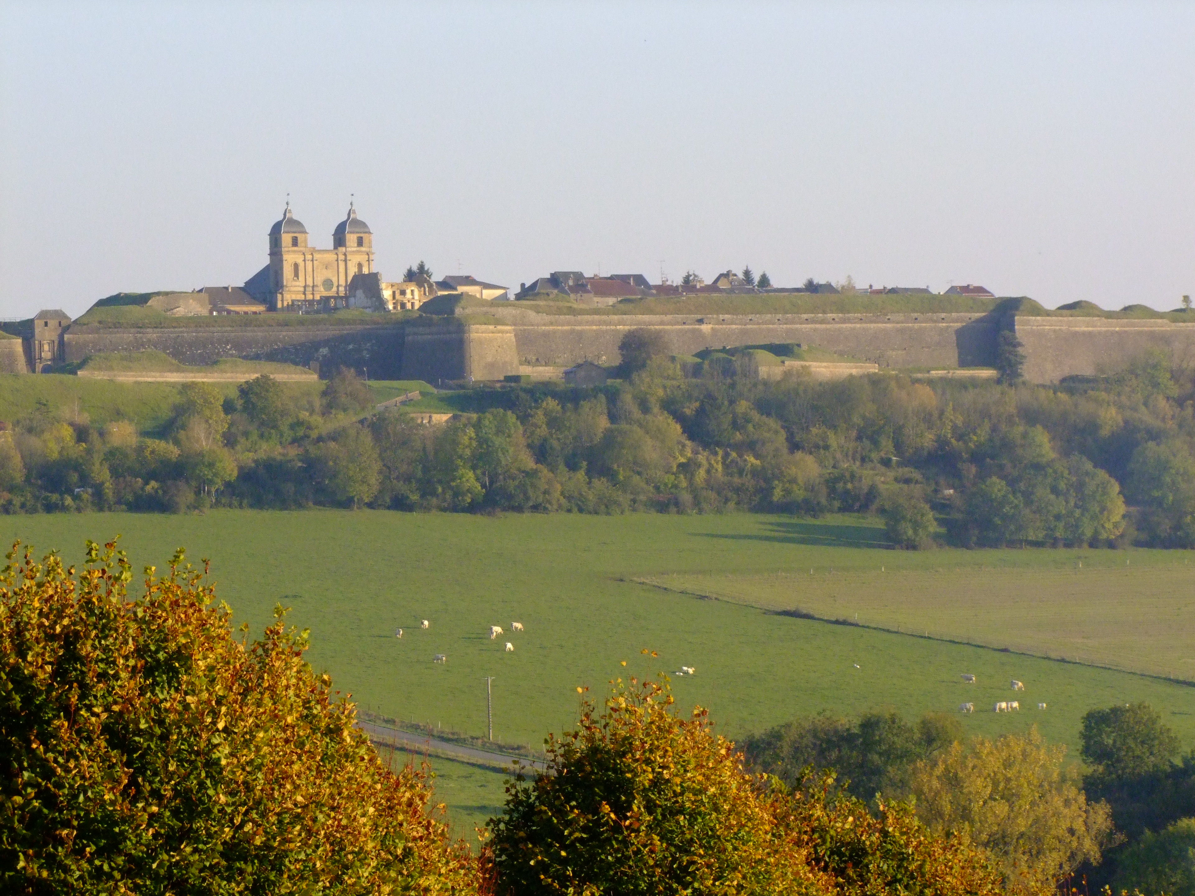 Citadelle de Montmédy avec l'église Sain-Martin